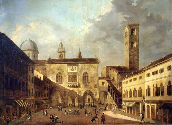 Veduta di Piazza Vecchia a Bergamo Alta, olio su tela, 108 x 149 cm., Accademia Carrara, Bergamo